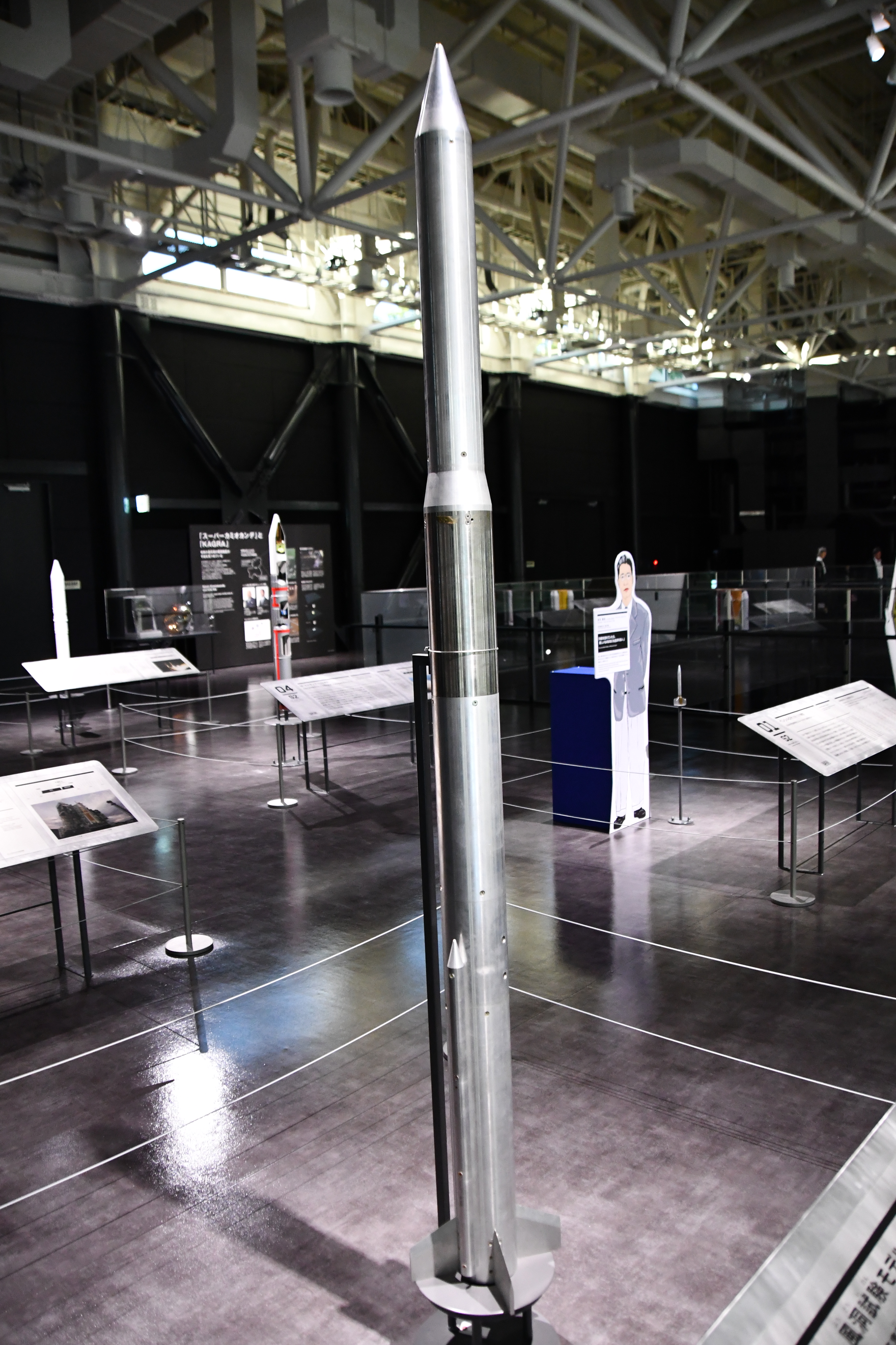 Qロケット 風洞試験モデル。2019年11月8日 かかみがはら航空宇宙科学博物館内にて。